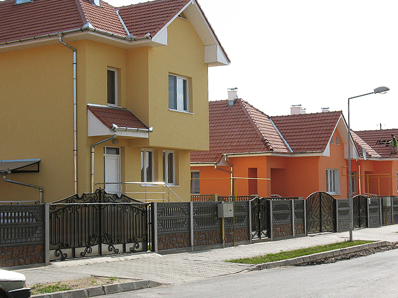 Cartierul Recea din Alba Iulia, unul din cele mai moderne cartiere construite în ultimii 20 de ani